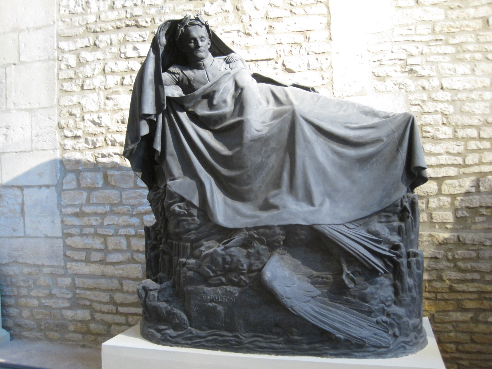 Musée François Rude de Dijon - Napoléon Bonaparte s'éveillant à l’immortalité - 1847 - Surmoulage en plâtre